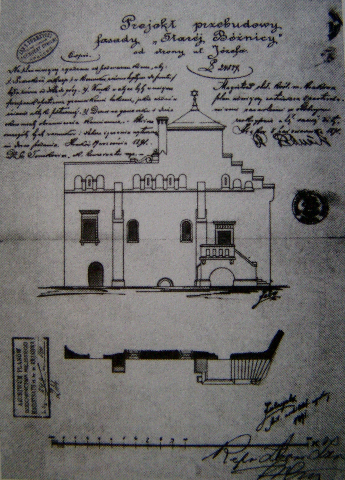 Projekt przebudowy zachodniej elewacji Starej Synagogi w Krakowie